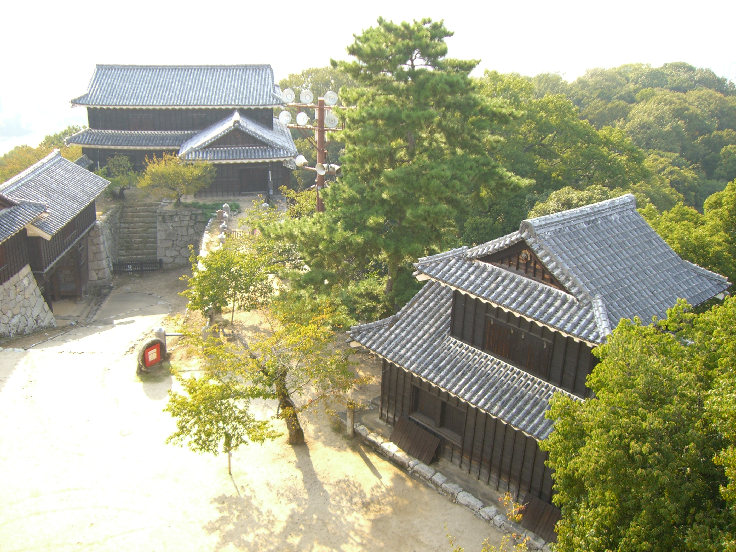 重要文化財の野原櫓と乾櫓（松山城）。